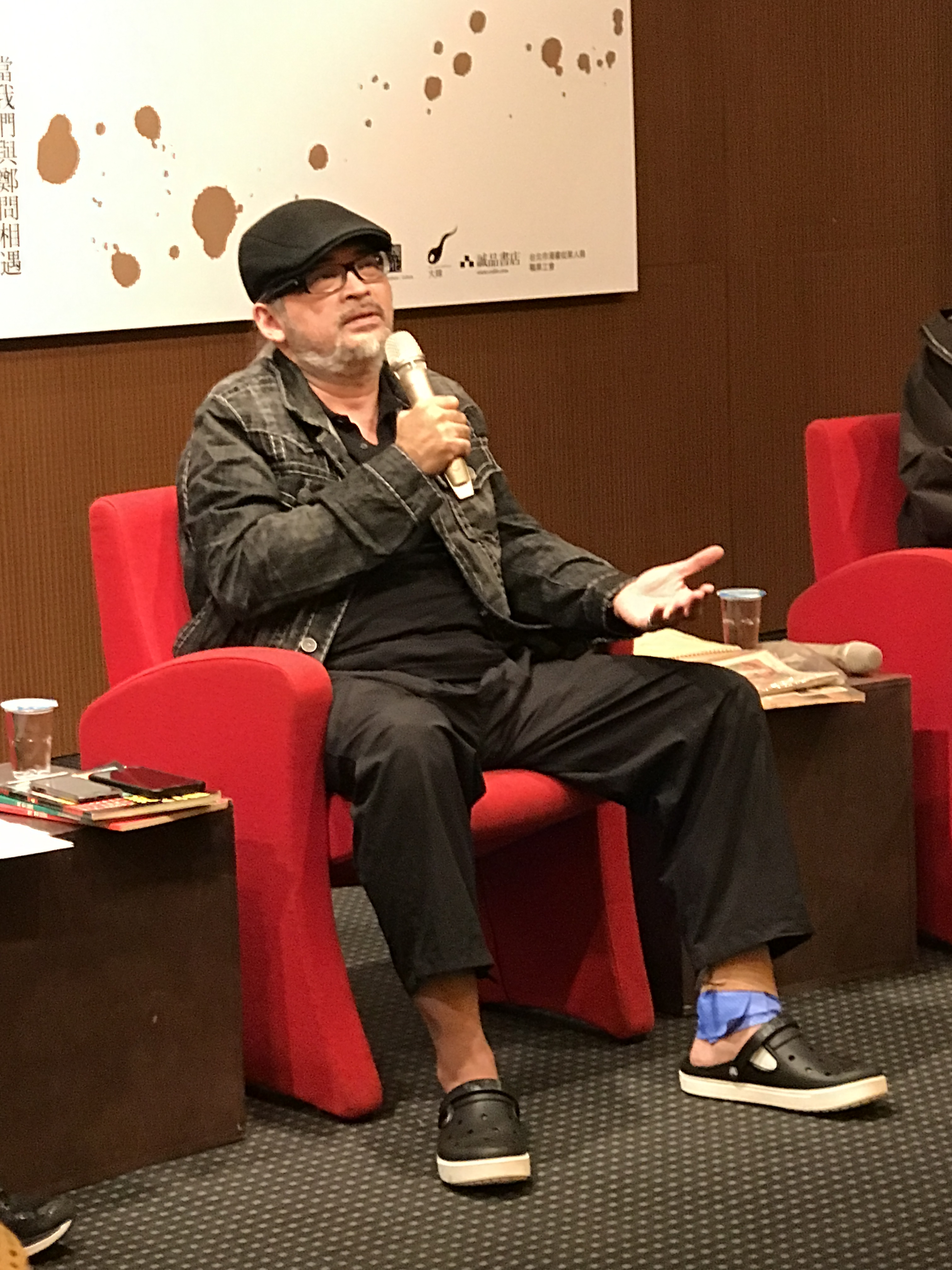 鄭問追思座談會中發言的麥人杰。